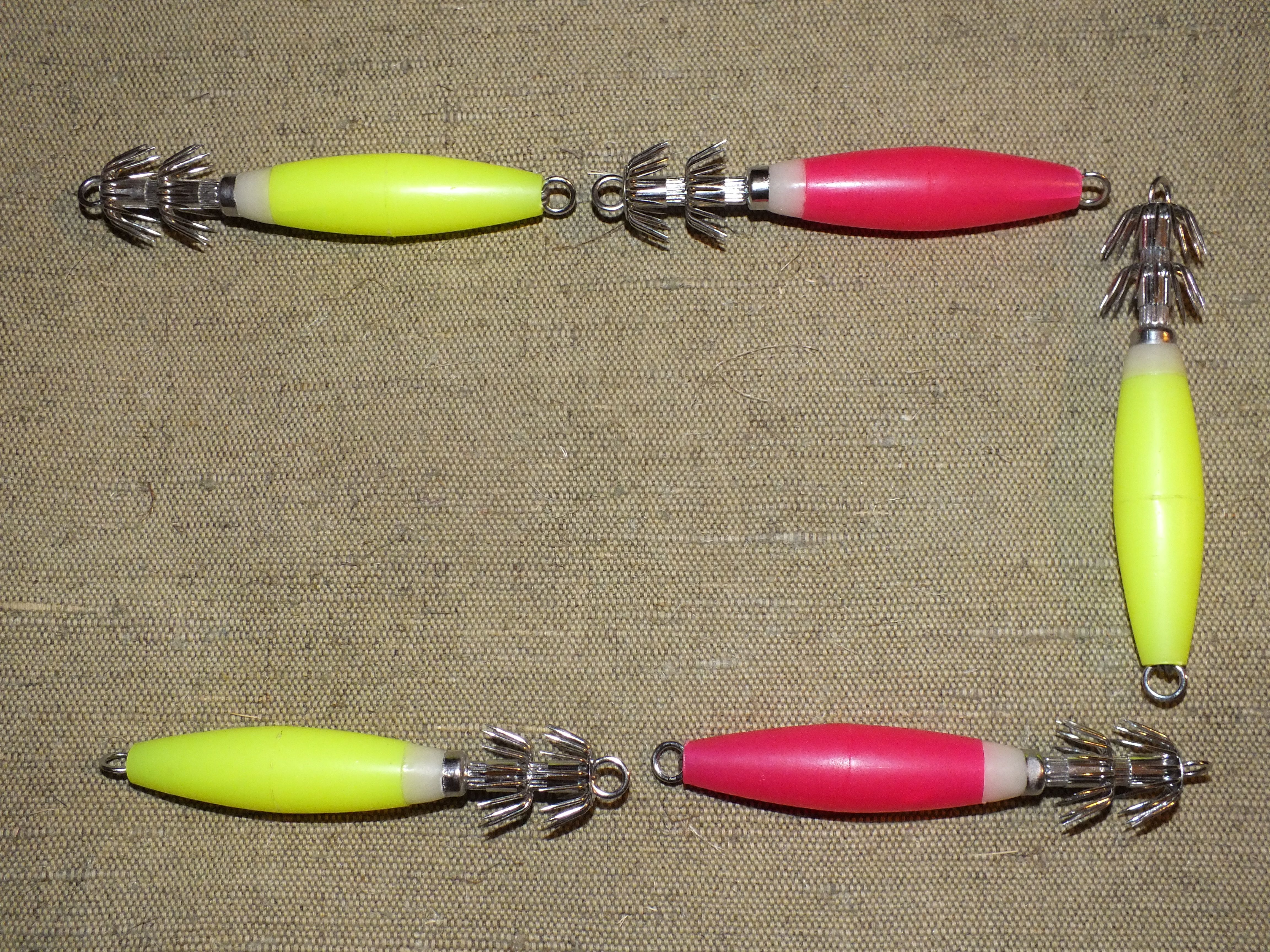 Кальмаровые блесны-ярусы